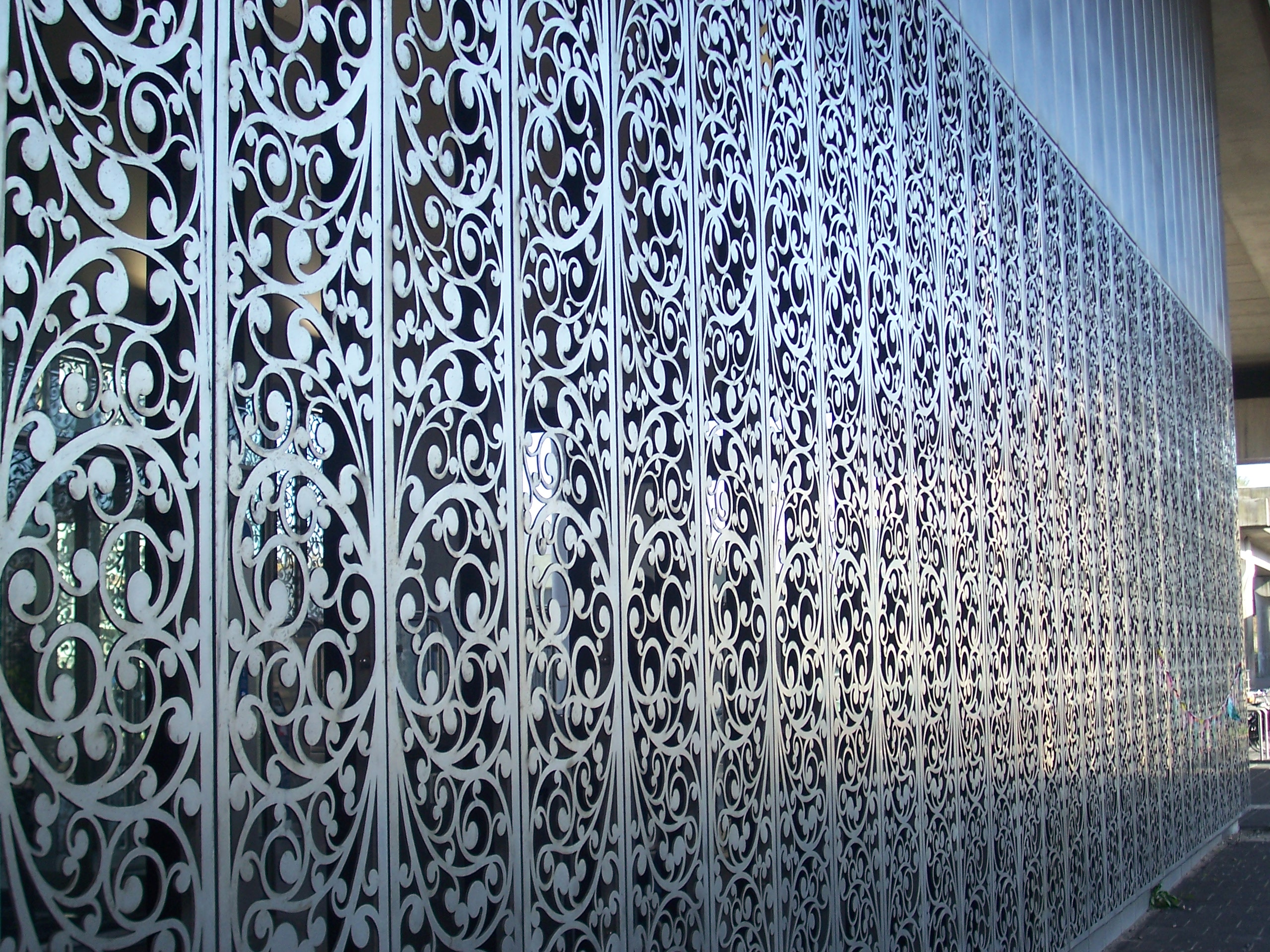 Decoratief en vandalisme (en graffiti) werend deel van een hekwerk, van het metrostation Kraaiennest, Maccreanor Lavington architecten